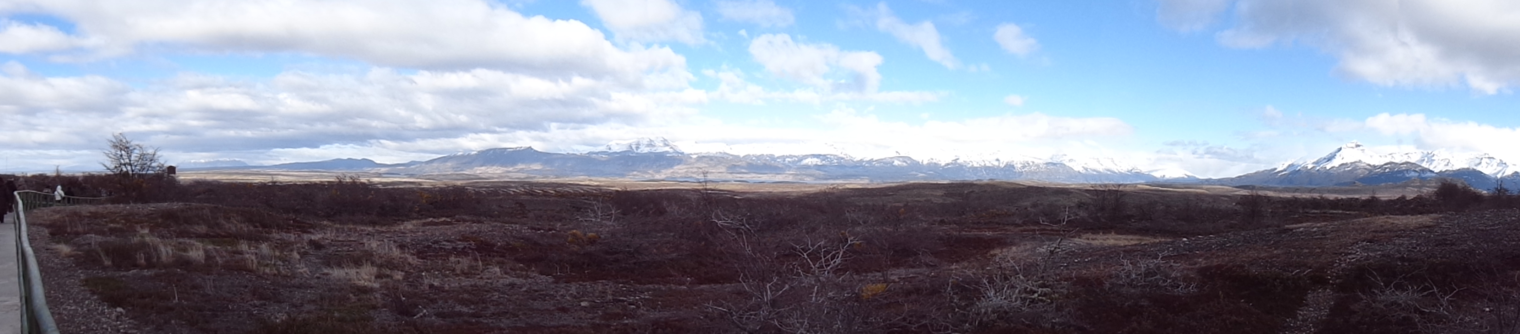 Vista panorámica desde la cueva del valle, Cerro Monumento Moore y el Fiordo Eberhard - Cuevas del Milodón This is a photo of a national monument in Chile: 960